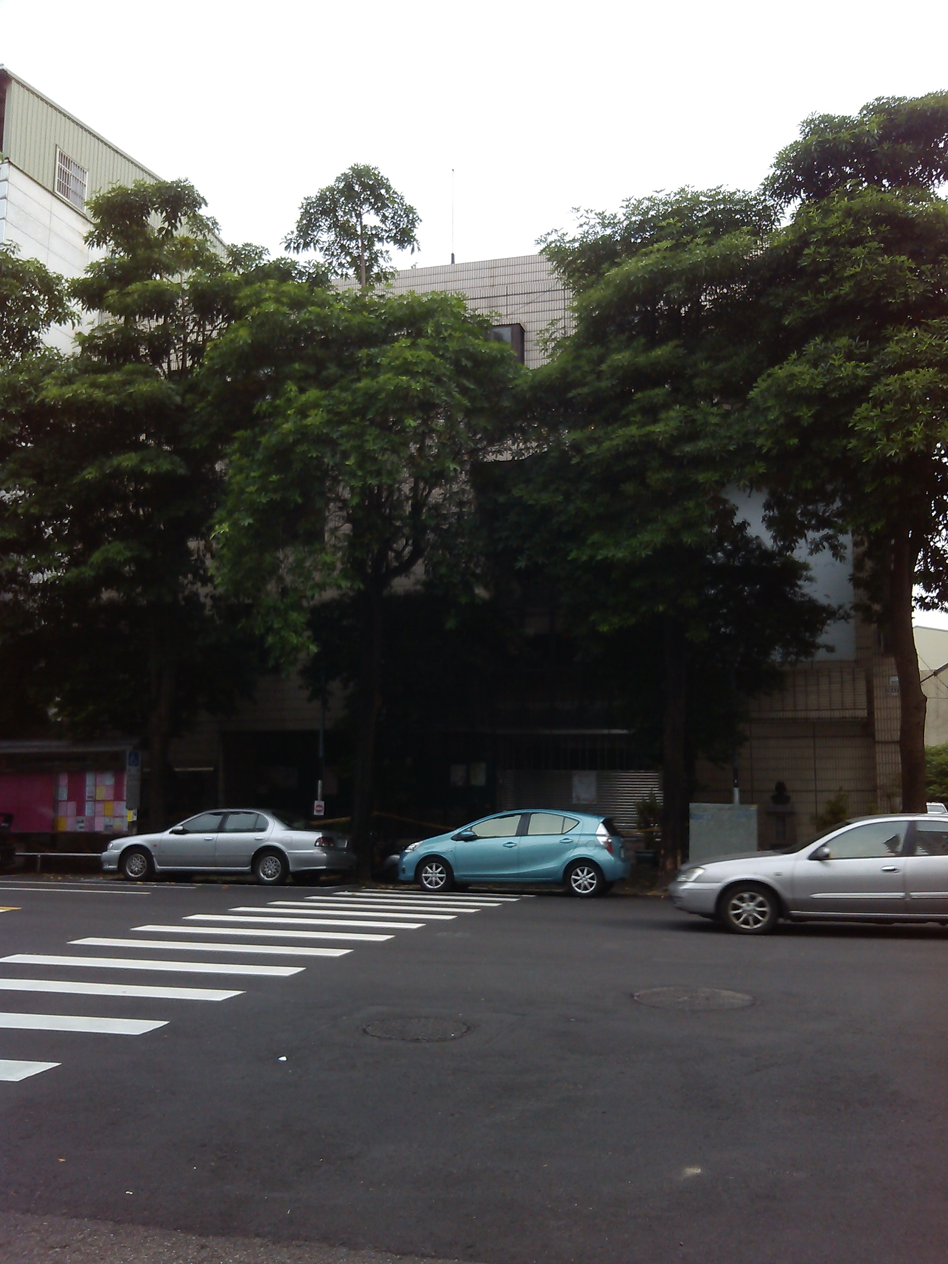 臺中市立圖書館北區分館舊館，已拆除，地址：臺中市北區健行路359號。